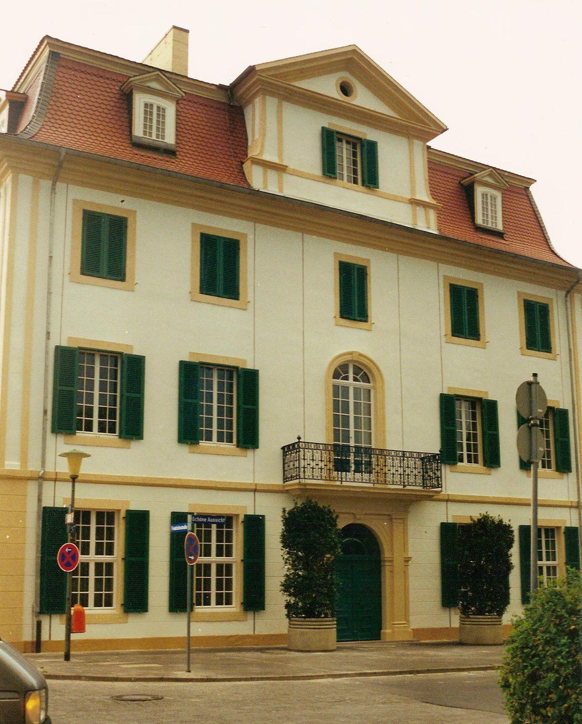 Palais Bellevue in Kassel